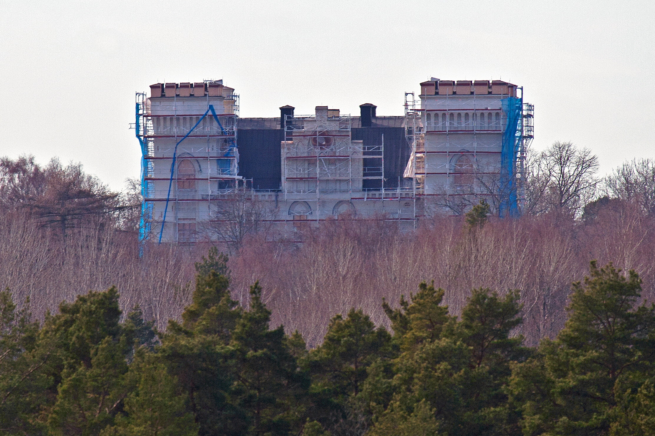 Bogesunds slott fasadrenovering 2012